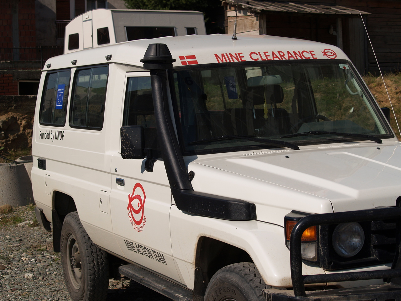 Gjakove Kosova